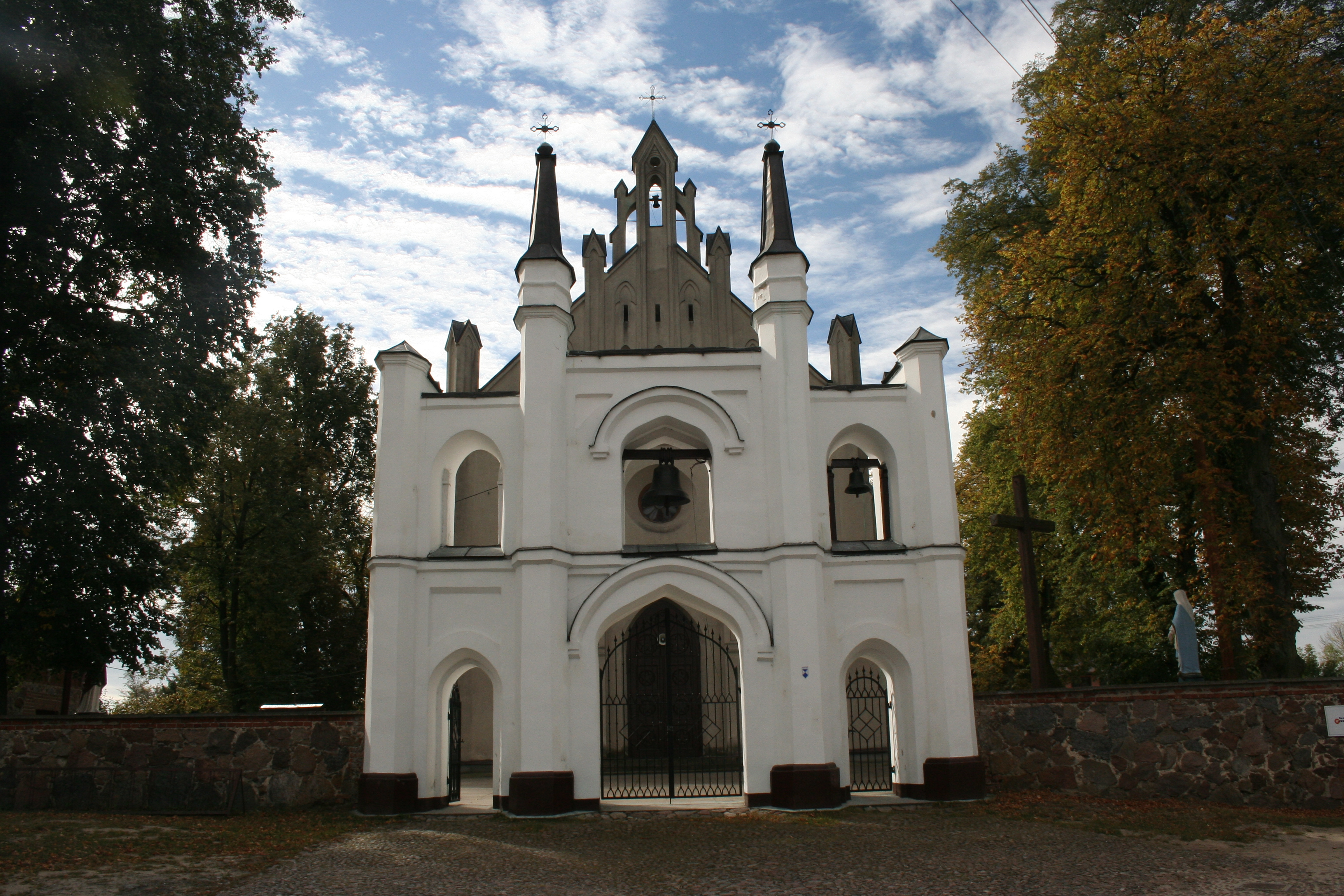 Huszlew - zespół kościoła parafialnego p.w. św. Antoniego Padewskiego, XIX; dzwonnica (zabytek nr /A-186)